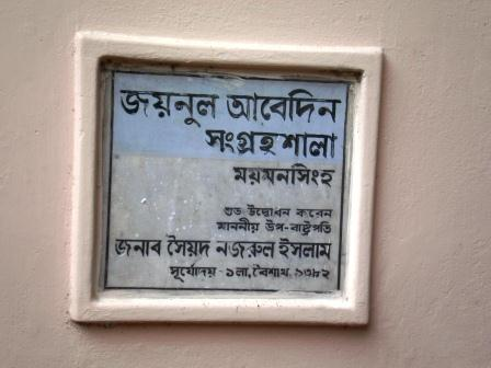 জয়নুল আবেদিন সংগ্রহশালার উদ্বোধন করেন ১৩৮২ সনের ১লা বৈশাখ বাংলাদেশের উপ-রাষ্ট্রপতি সৈয়দ নজরুল ইসলাম৤